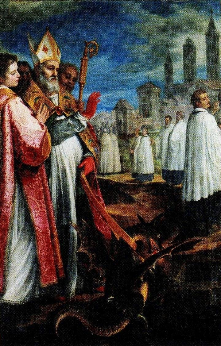 Perkele, dipinto che rappresenta San Mercuriale che ammansisce il drego. Il quadro è un dipinto del Cigoli del 1606